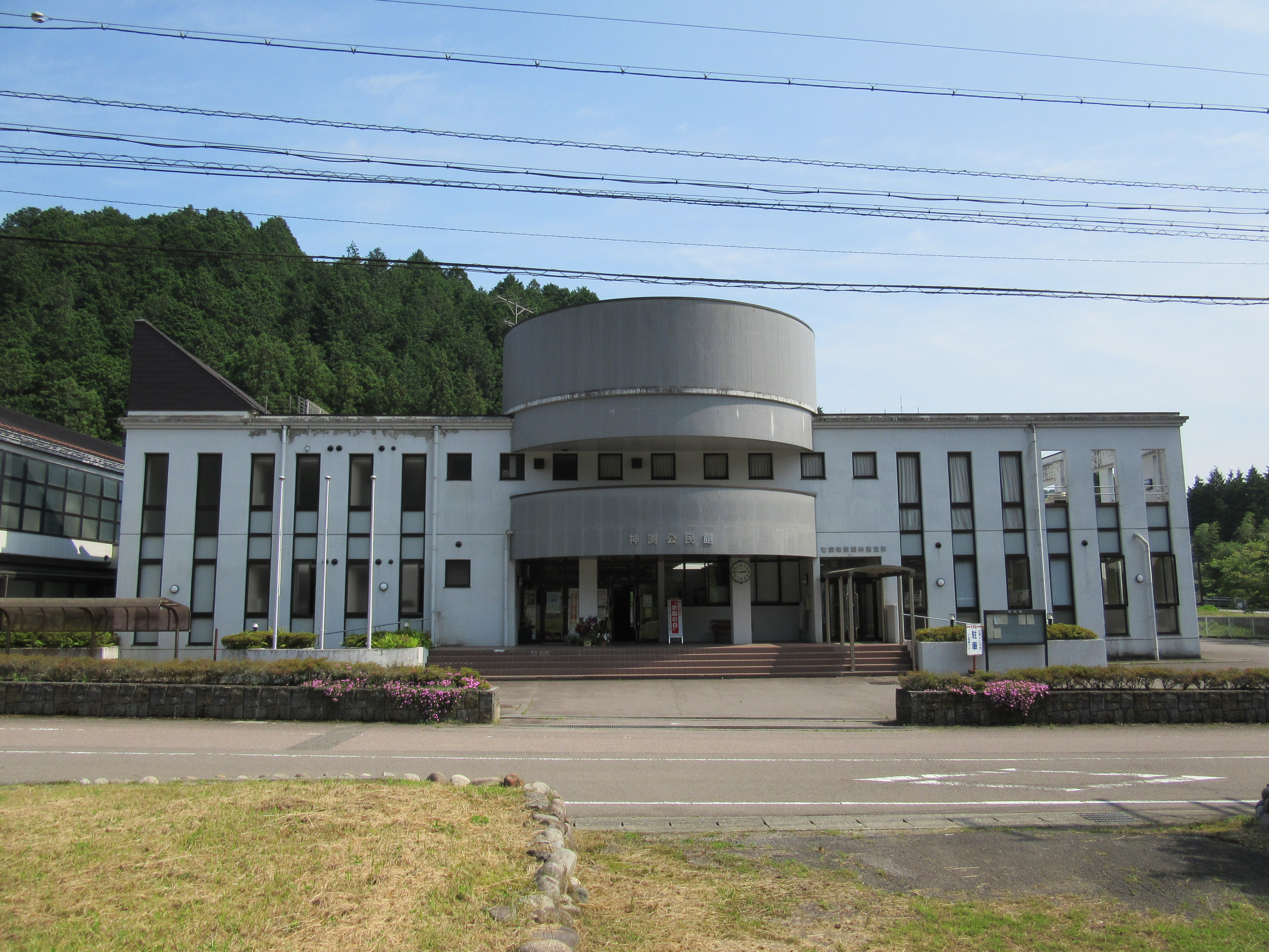 七宗町役場神淵支所